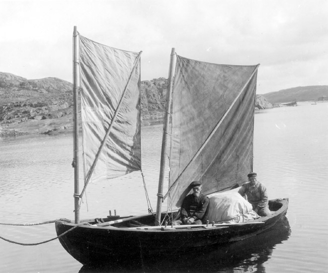 Robåt i Fjällbacka. t.v. T. Kjellberg. Foto från 1929.